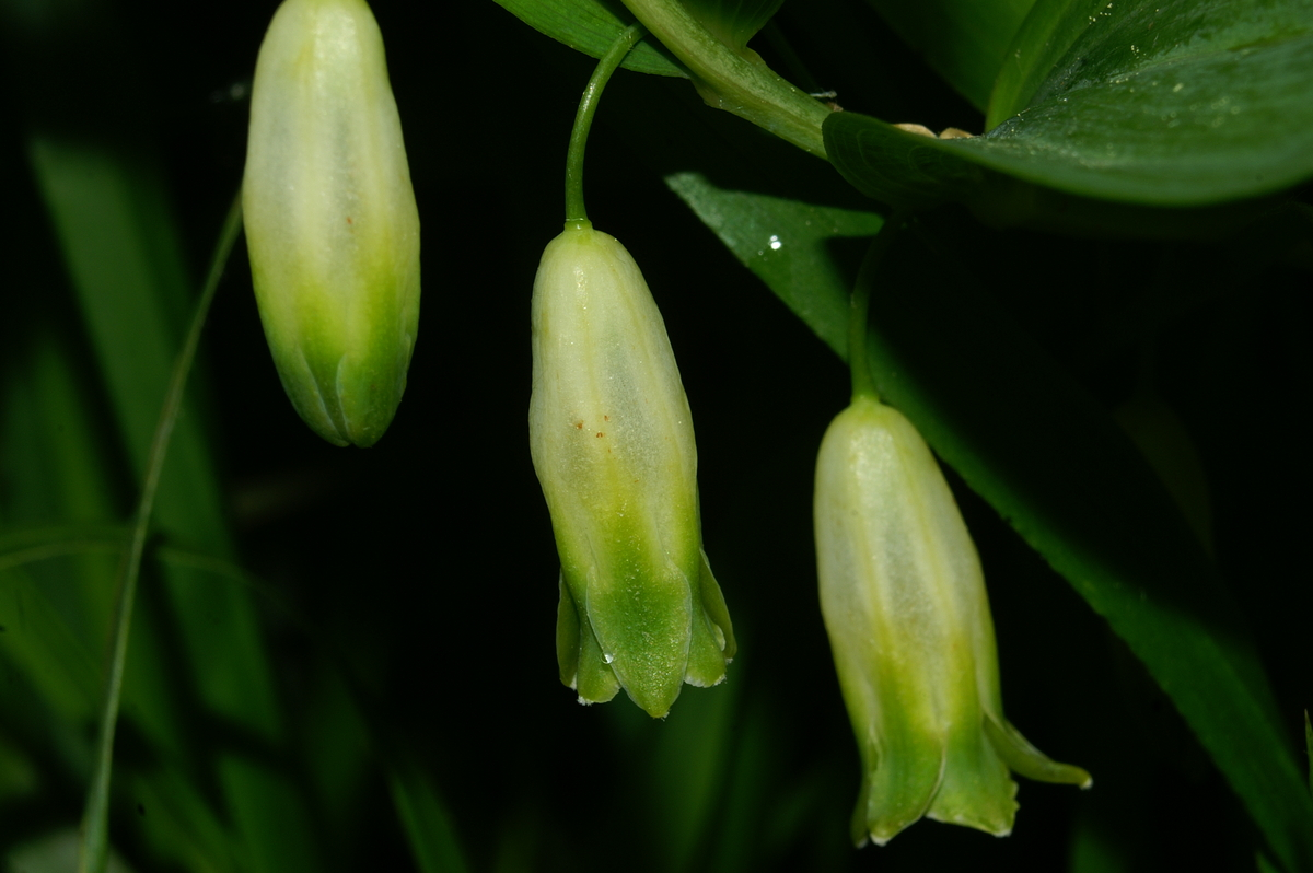 Dišeči salomonov pečatnik na Mrzlici.